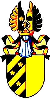 Erb Granovských z Granova